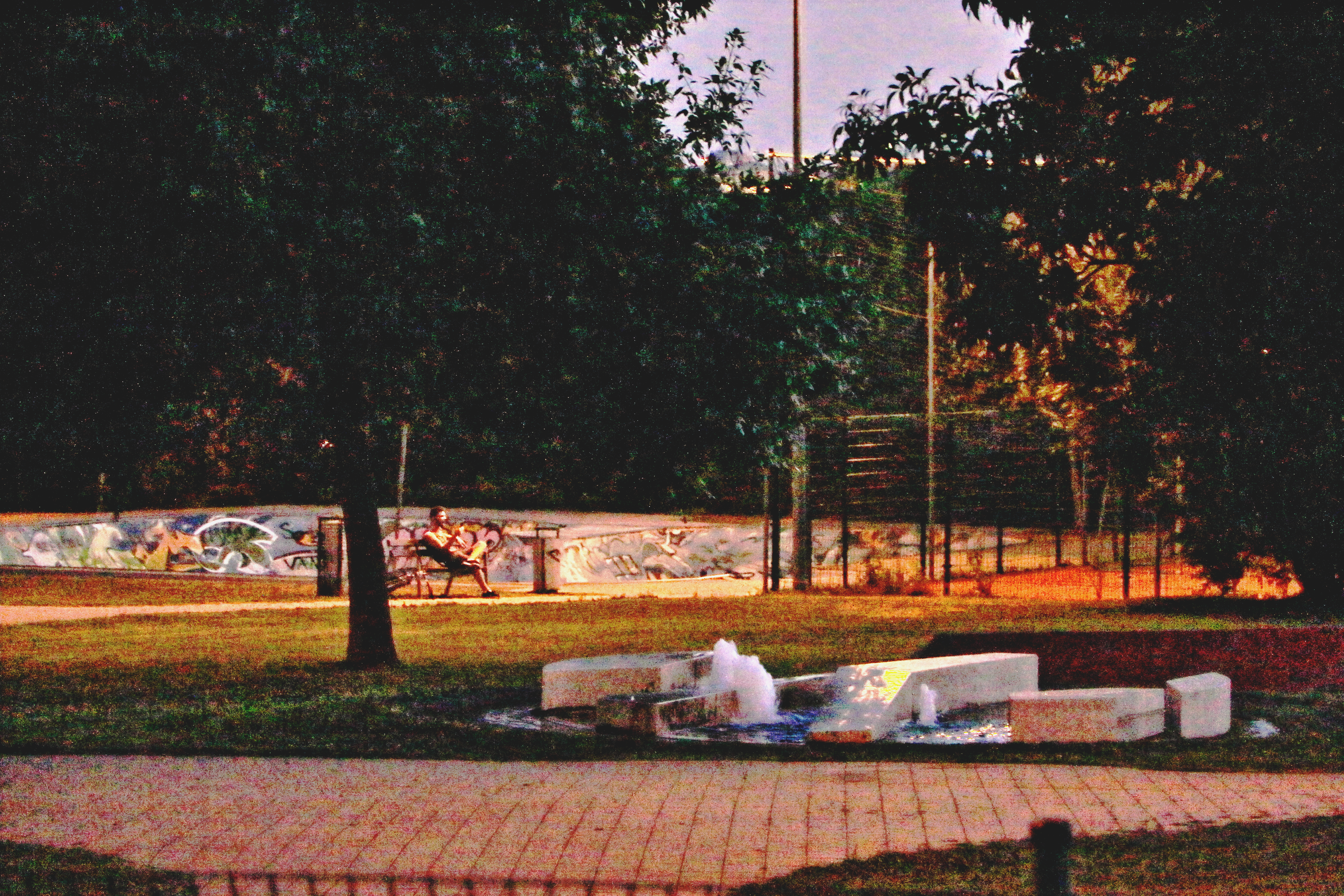 A Havashalom park és a Sashalmi Pool este